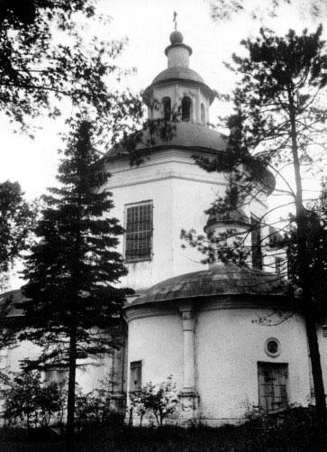 Dormition Church in Petrovskoye (Dalneye)Успенская церковь в Петрове-Дурневе, 1684-88